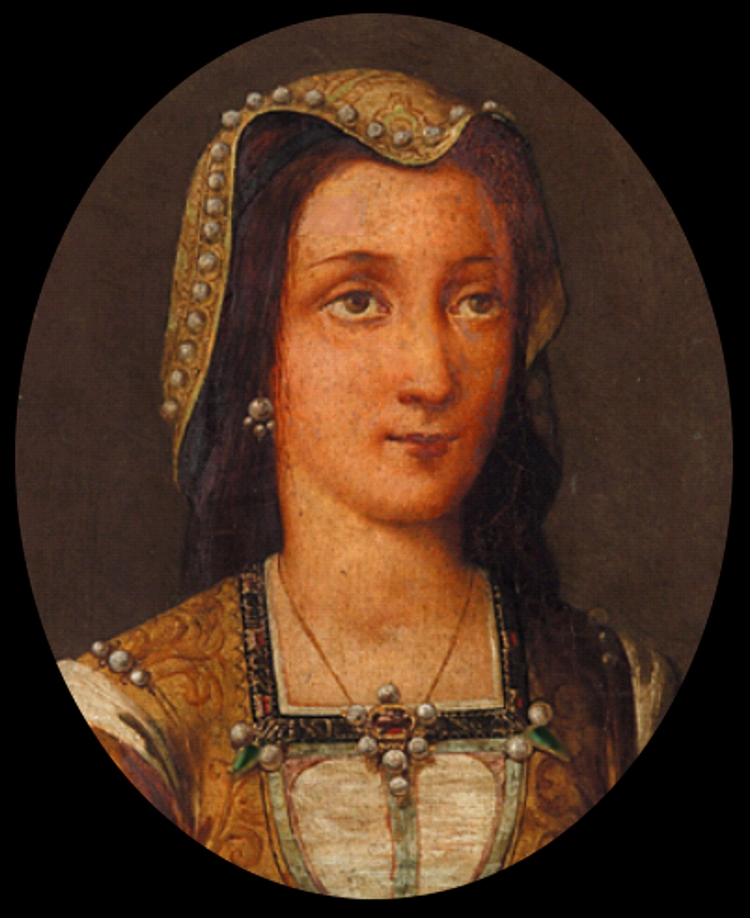 Médaillon représentant Claudine de Brosse, duchesse de Savoie